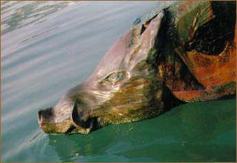 Таран диеры "Ивлия", в Эгейском море